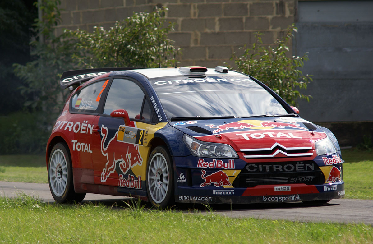 D. Sordo / M. Marti, Citroën C4, Rallye Deutschland 2008